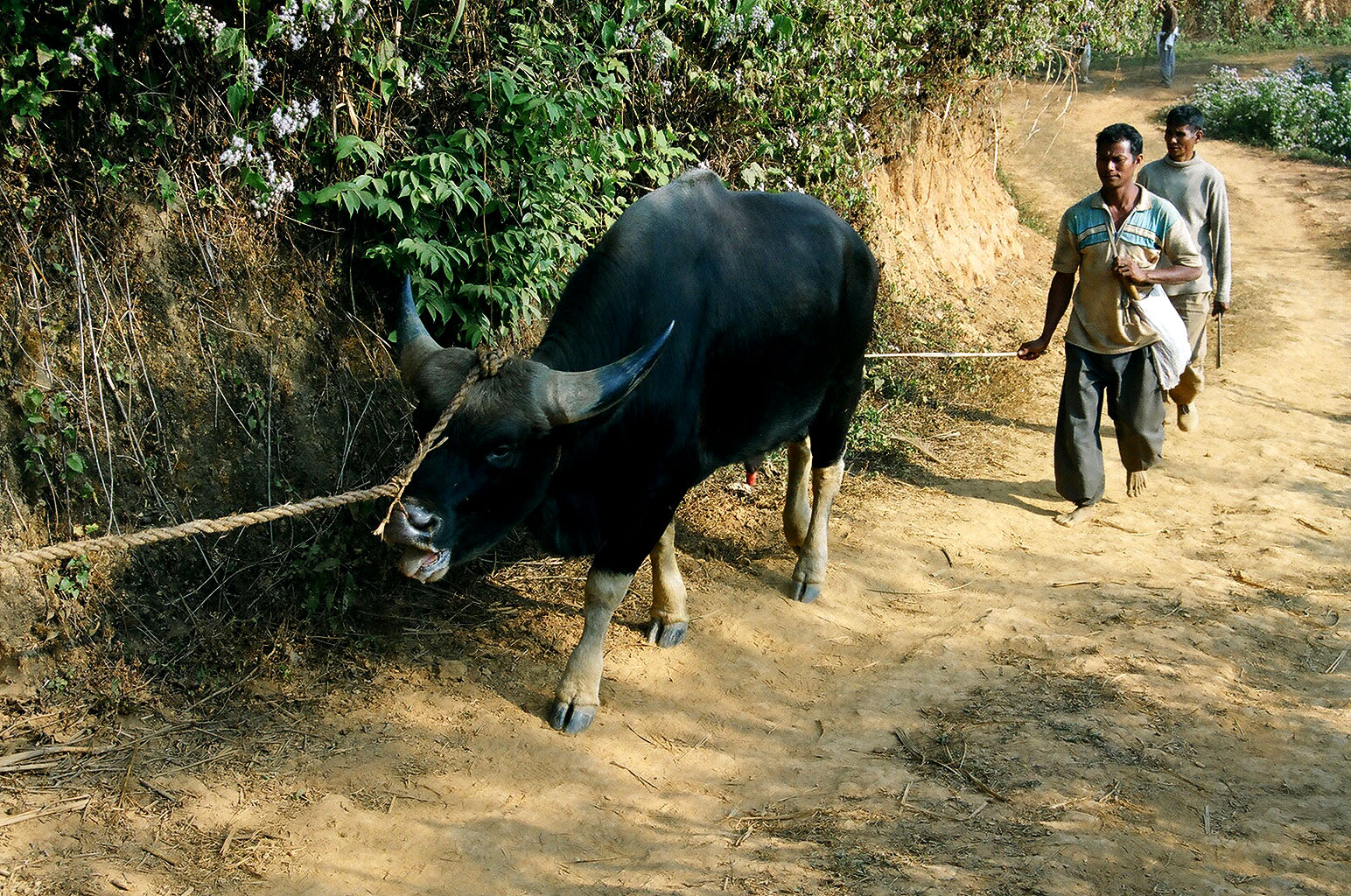 Gayal near Darjeeling Para in Bandarban, Bangladesh